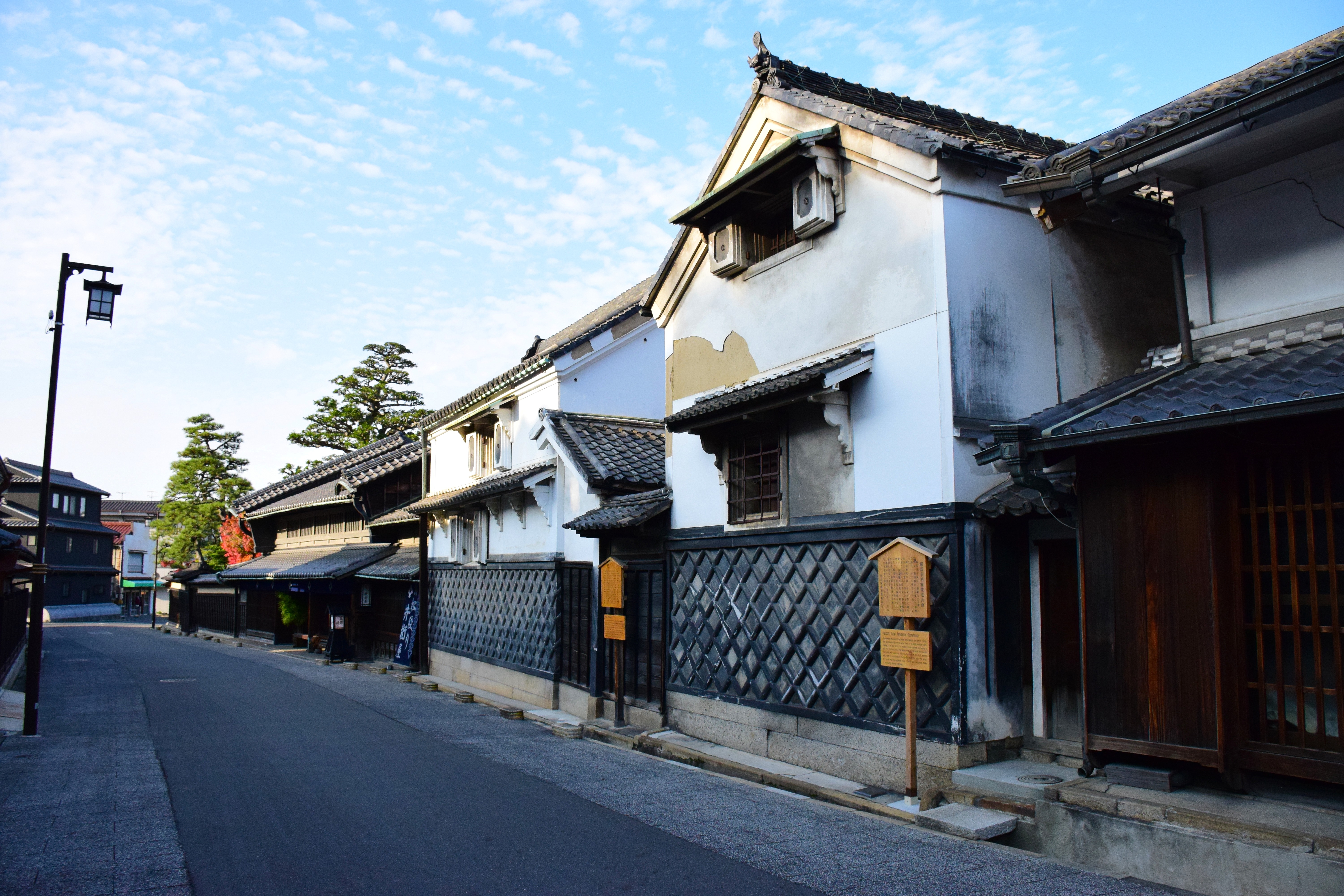 有松の街並み